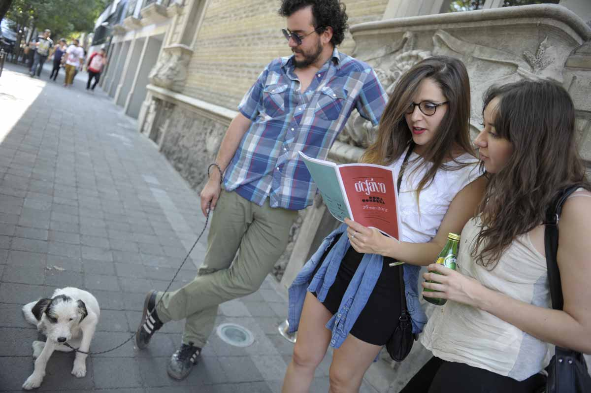 Participantes del Corredor Cultural Roma Condesa 2012.